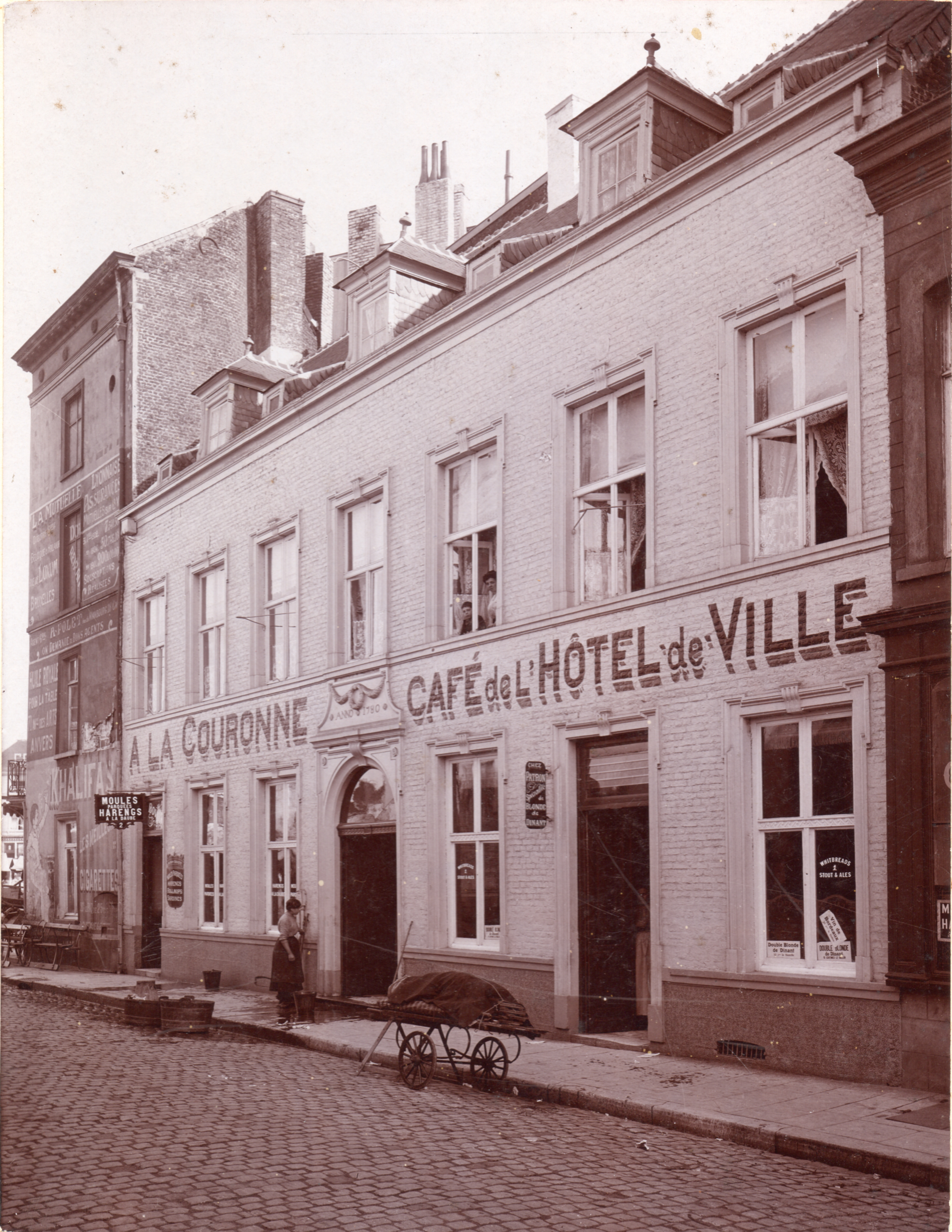 Charleroi (Belgique) - Maison du bailli au début du 20e siècle